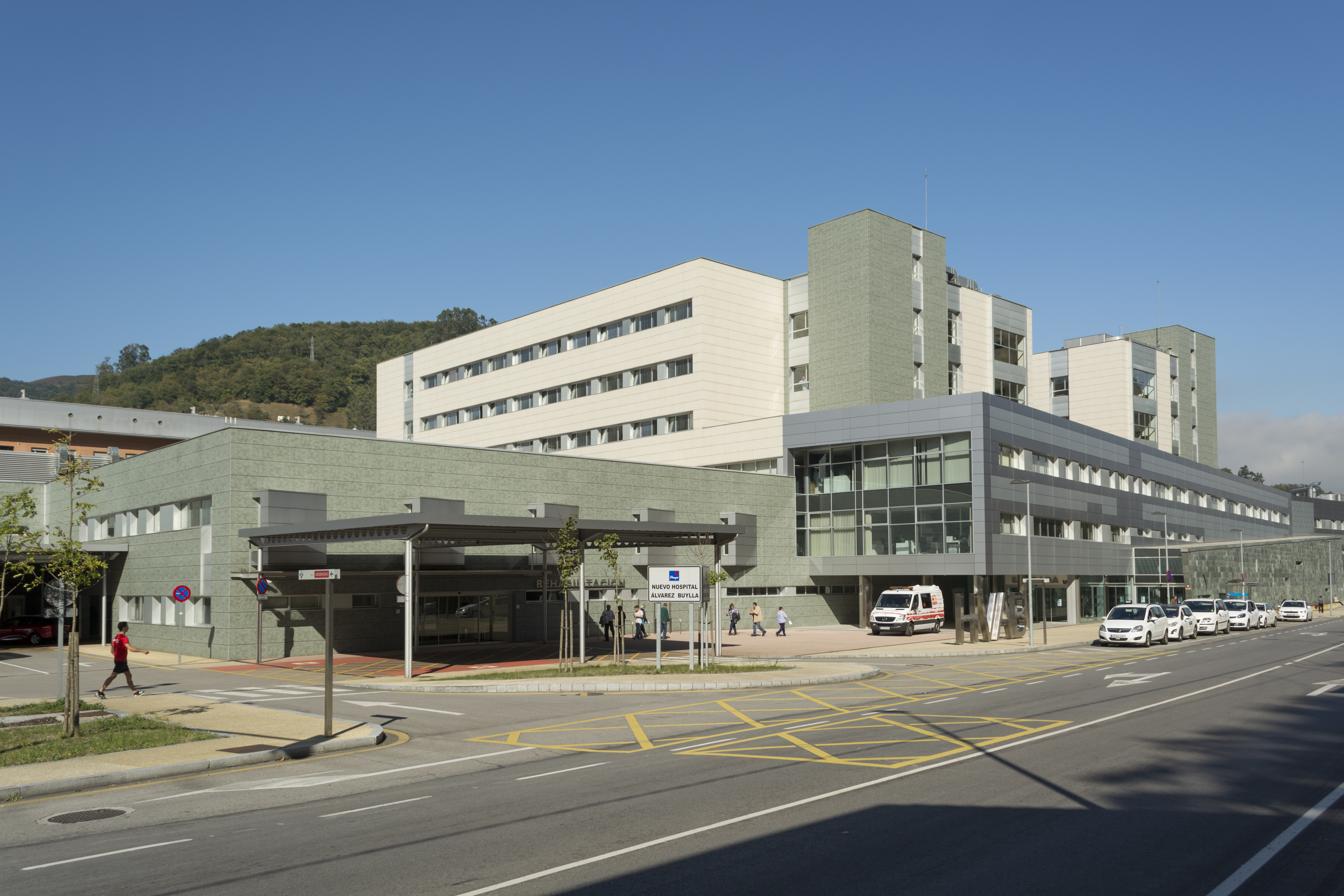 Hospital Álvarez-Buylla, Mieres